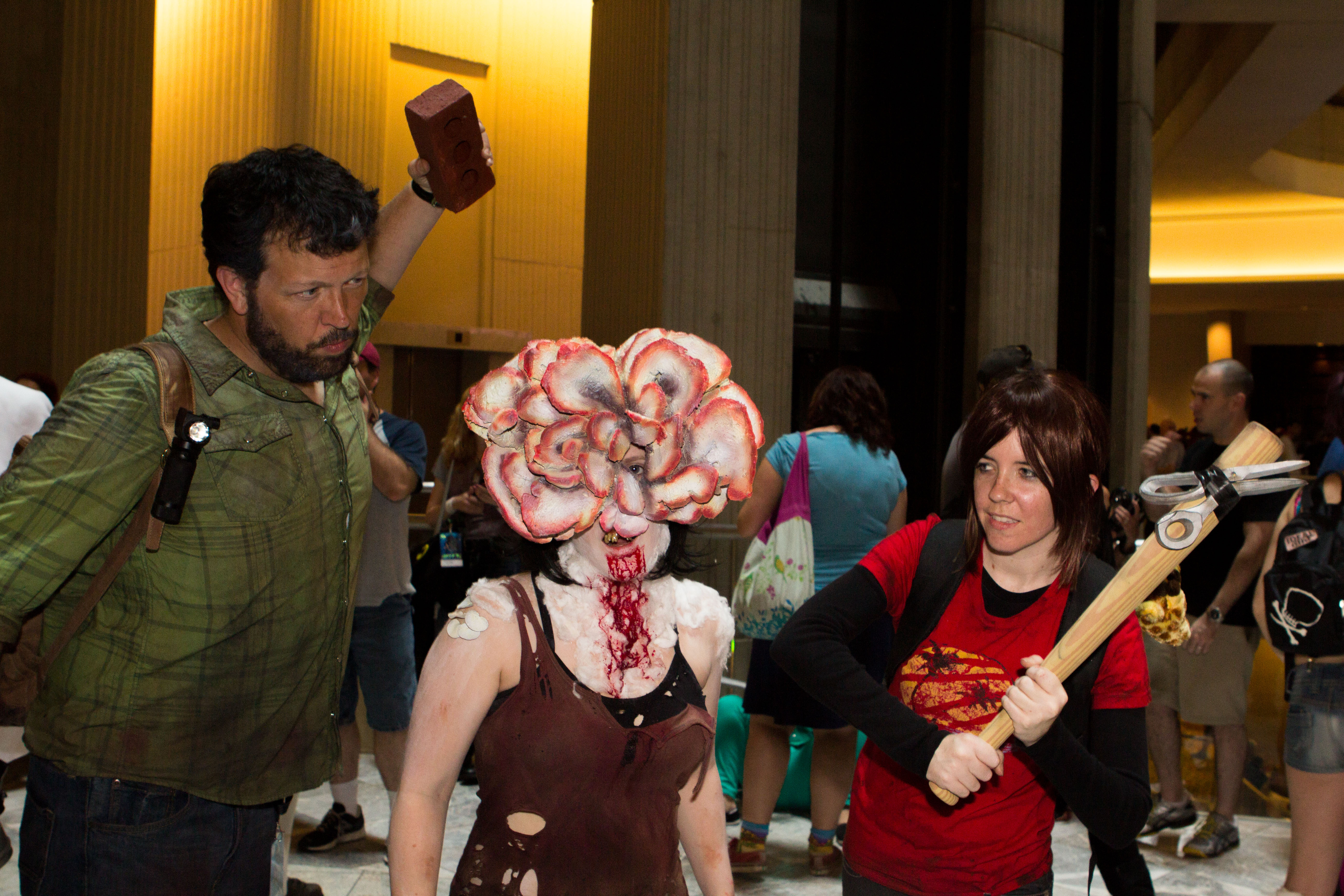 Cosplay at Dragon*Con 2013.